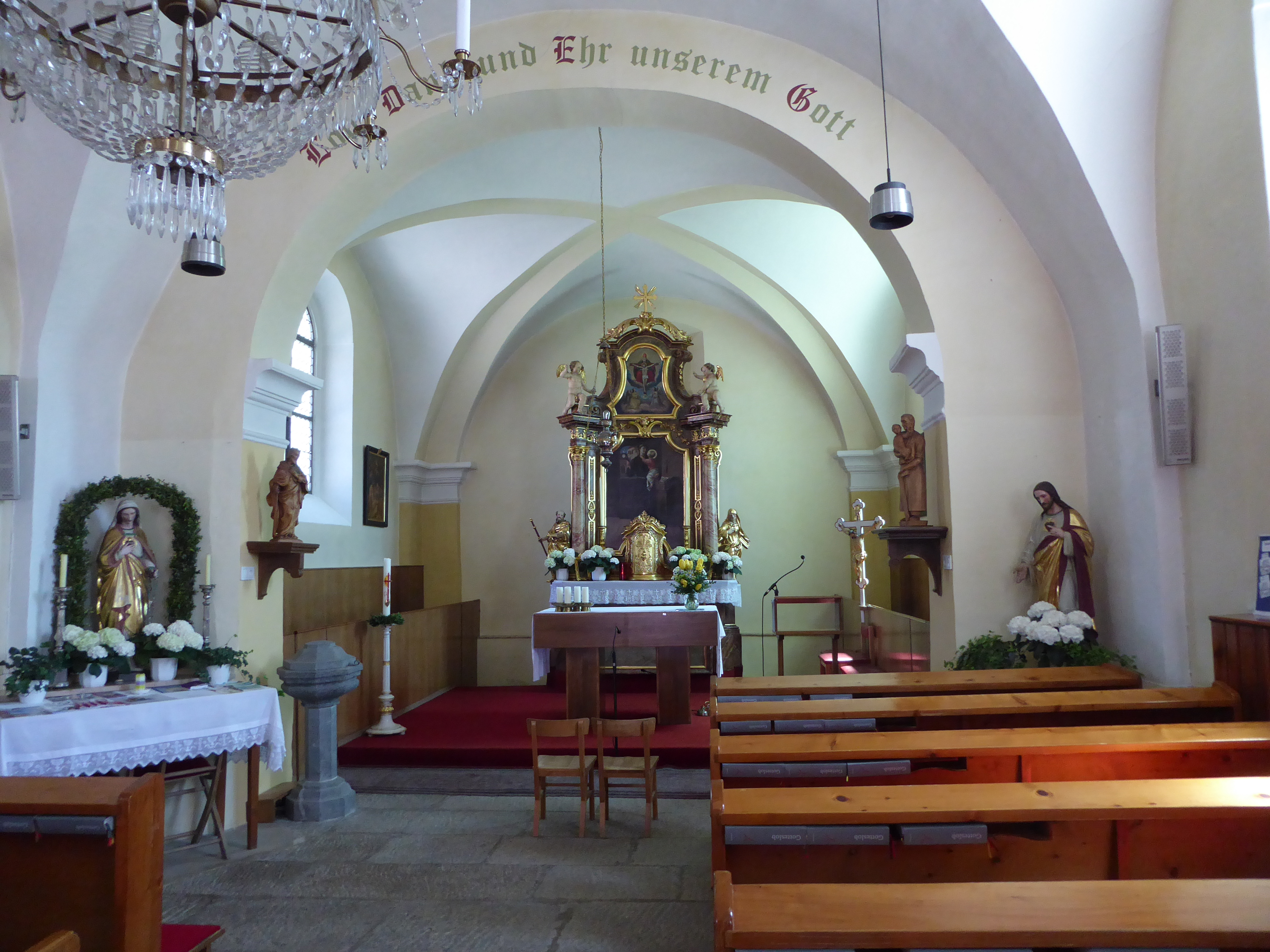 Pfarrkirche hl. Antonius von Padua, Jagenbach, Zwettl, Niederösterreich - Innenansicht